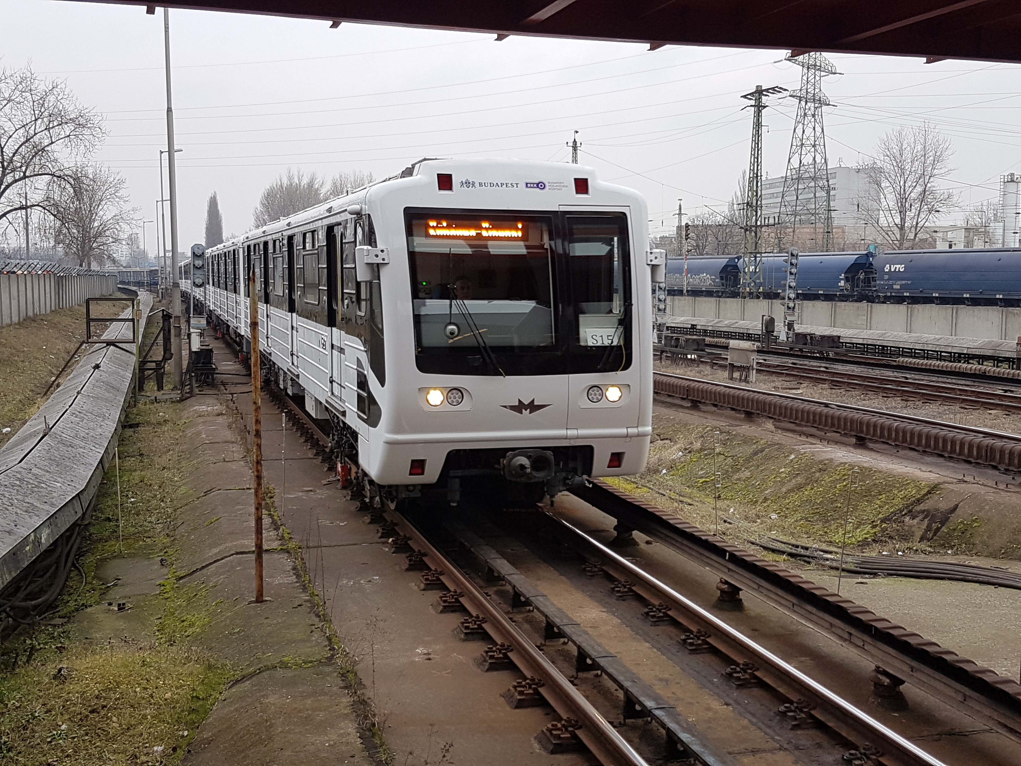 Rame rénovée de type 81-717-714 au terminus du métro 3 de Budapest, Kőbánya-Kispest.